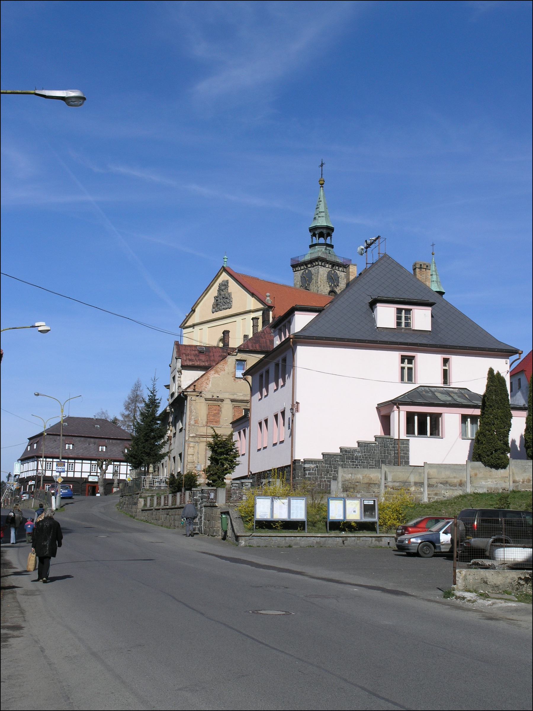 v popředí budova městského úřadu v Mikulášovicích